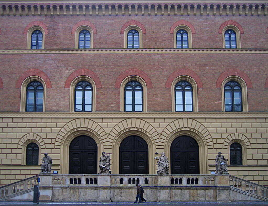 München, Ludwigstraße 16, Bayerische Staatsbibliothek, Freitreppe und Eingangsportal, 4 Kopien von Originalstatuen (von links nach rechts): Thukydides, Homer, Aristoteles und Hippokrates (Entwurf: Ludwig Michael Schwanthaler). Die Originale befinden sich seit 1964 auf dem Schulpark der Grundschule in Bernau am Chiemsee (Denkmal D-1-87-118-44).